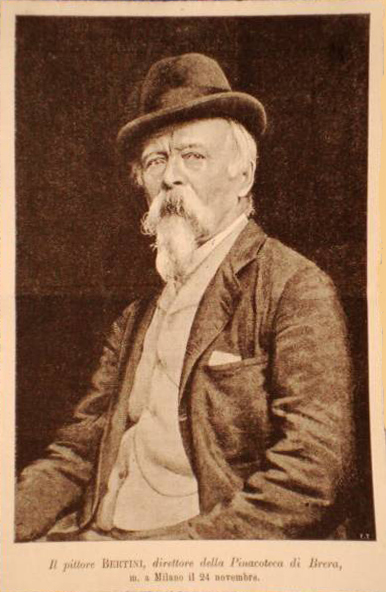 Foto di Giuseppe Bertini (1825-1898)